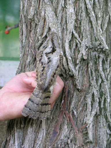 סבראש על רקע עץ מציג צבעי הסוואה